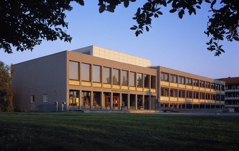 Hovedkontoret (administrasjonen) til Akershus fylkesmuseum.